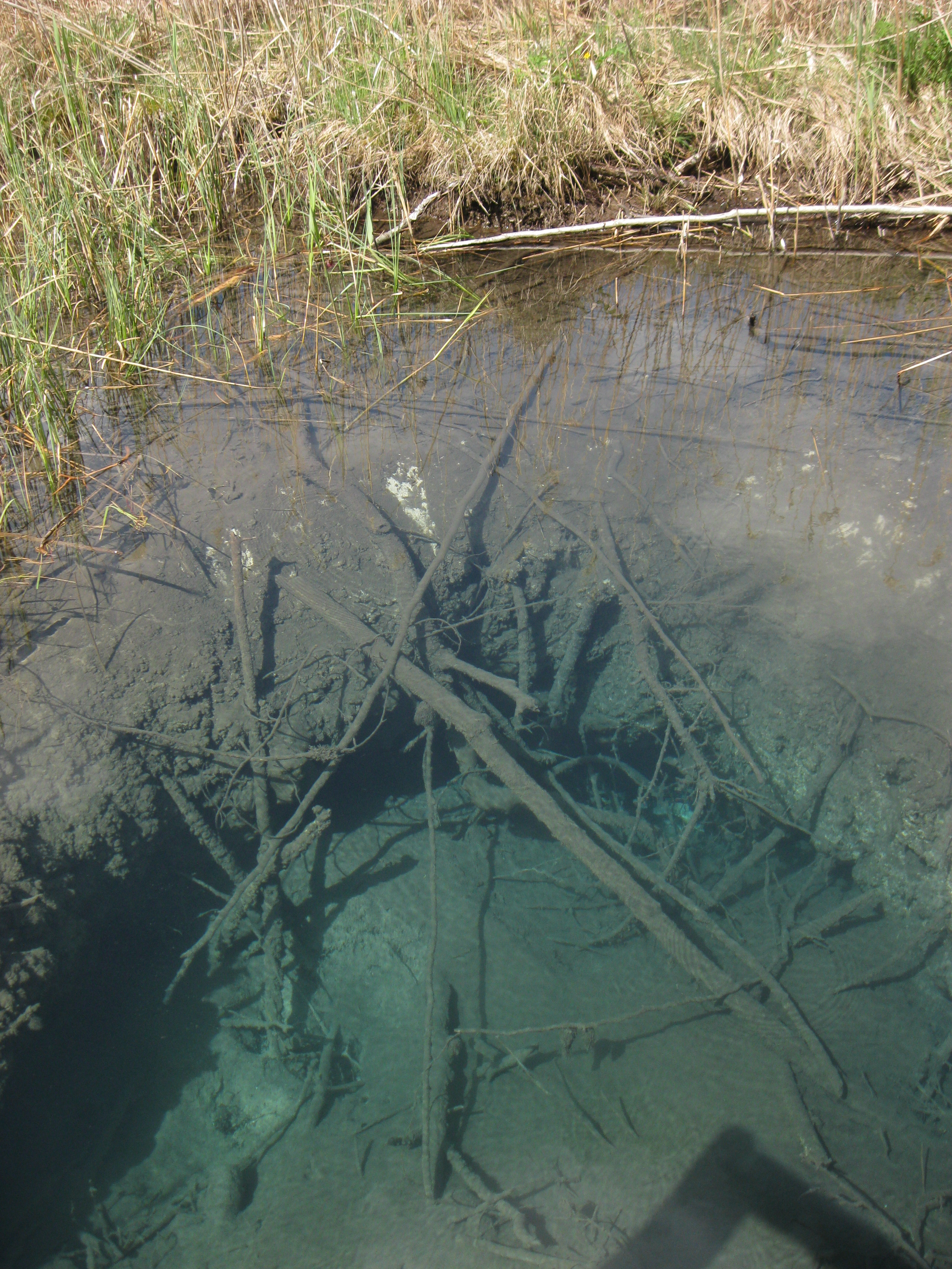 Quelltopf in den Osterseen (NSG-00143.01).